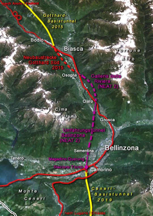 Neubaustrecken der Gotthardachse Süd der Neuen Eisenbahn-Alpentransversale NEAT zwischen Biasca und Camorino in der Schweiz (pink: Projektstudien im Rahmen der sogenannten NEAT 2); Ausschnitt / Vergrösserung der Grafik 'NEAT_Gotthardachse_Süd.jpg'